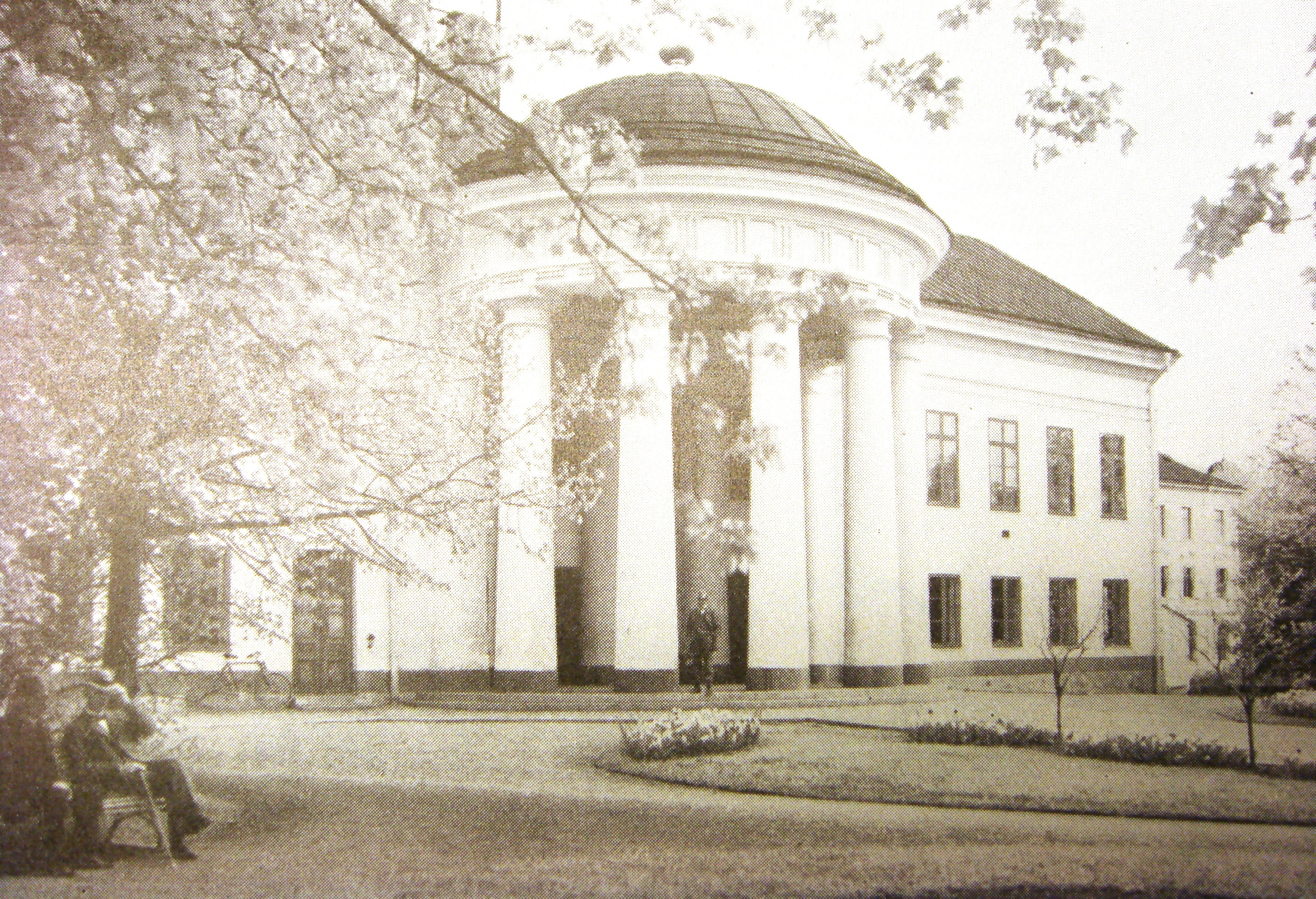 Härnösands gamla gymnasium . Photocopy.